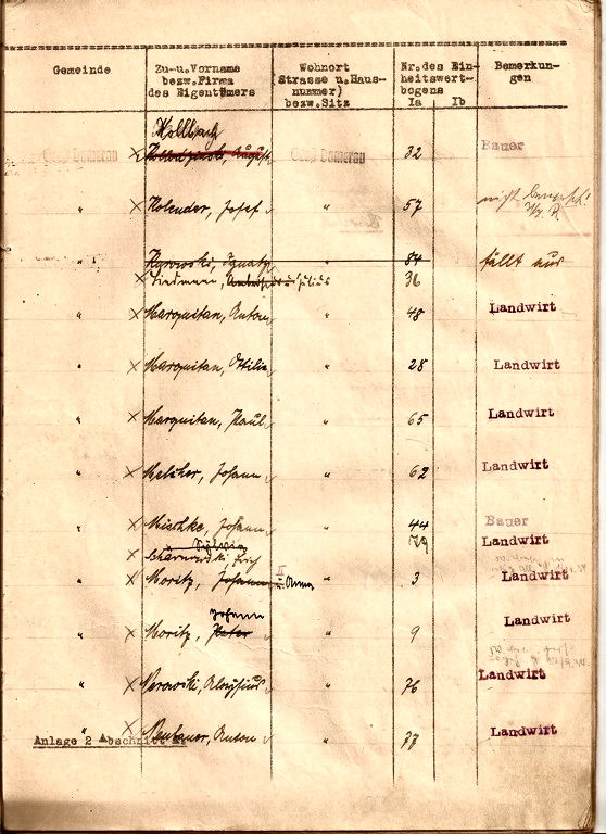 Spis właścicieli i użytkowników działek we wsi Gross Damerau (Dąbrówka Wielka), 1937 rok. (jedna ze stron)